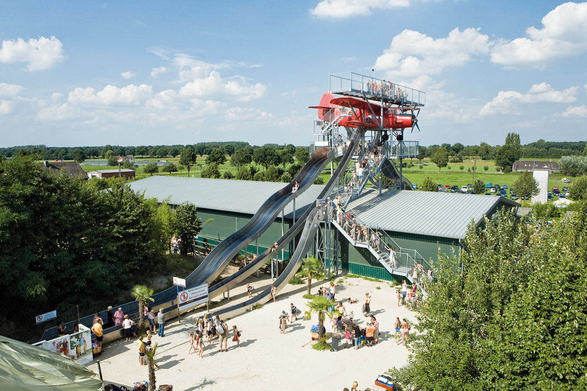 atlantics Spielrutsche